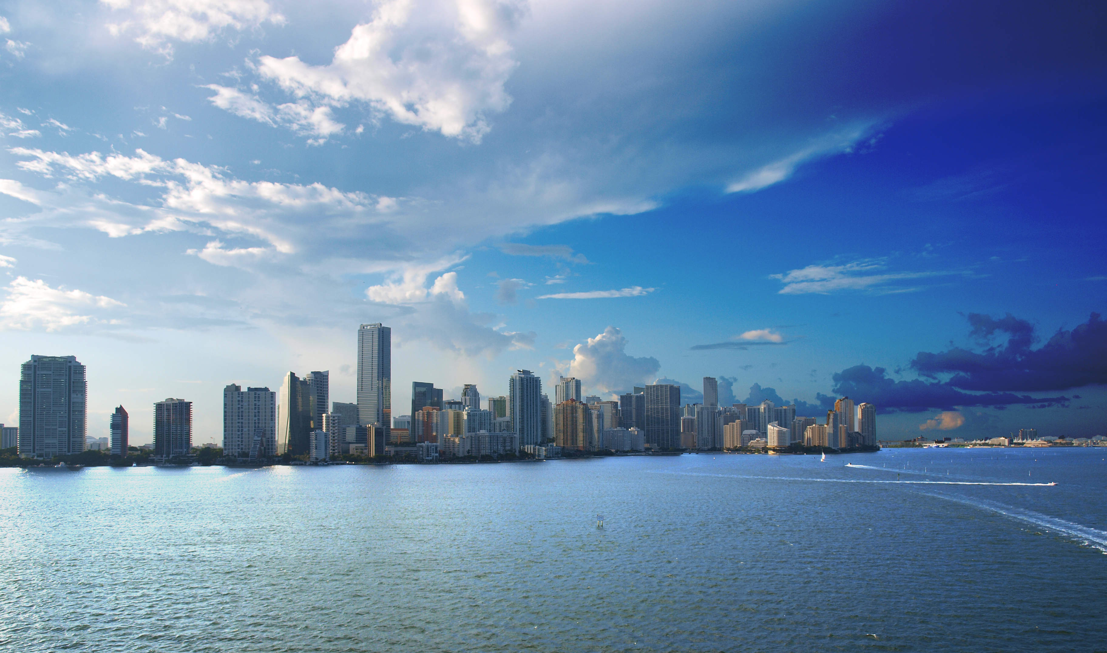 DownTown, Miami, Florida. 25°46′27″N 80°11′37″W